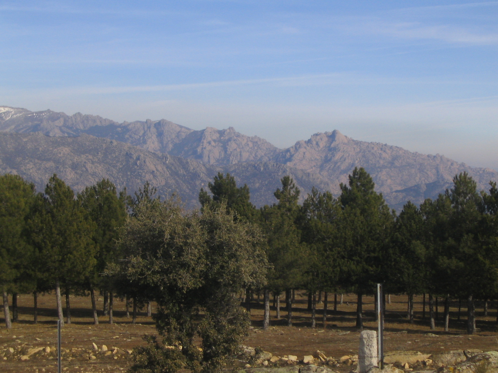 La Pedriza desde el Cerro Cañal (Sierra de Guadarrama, España).